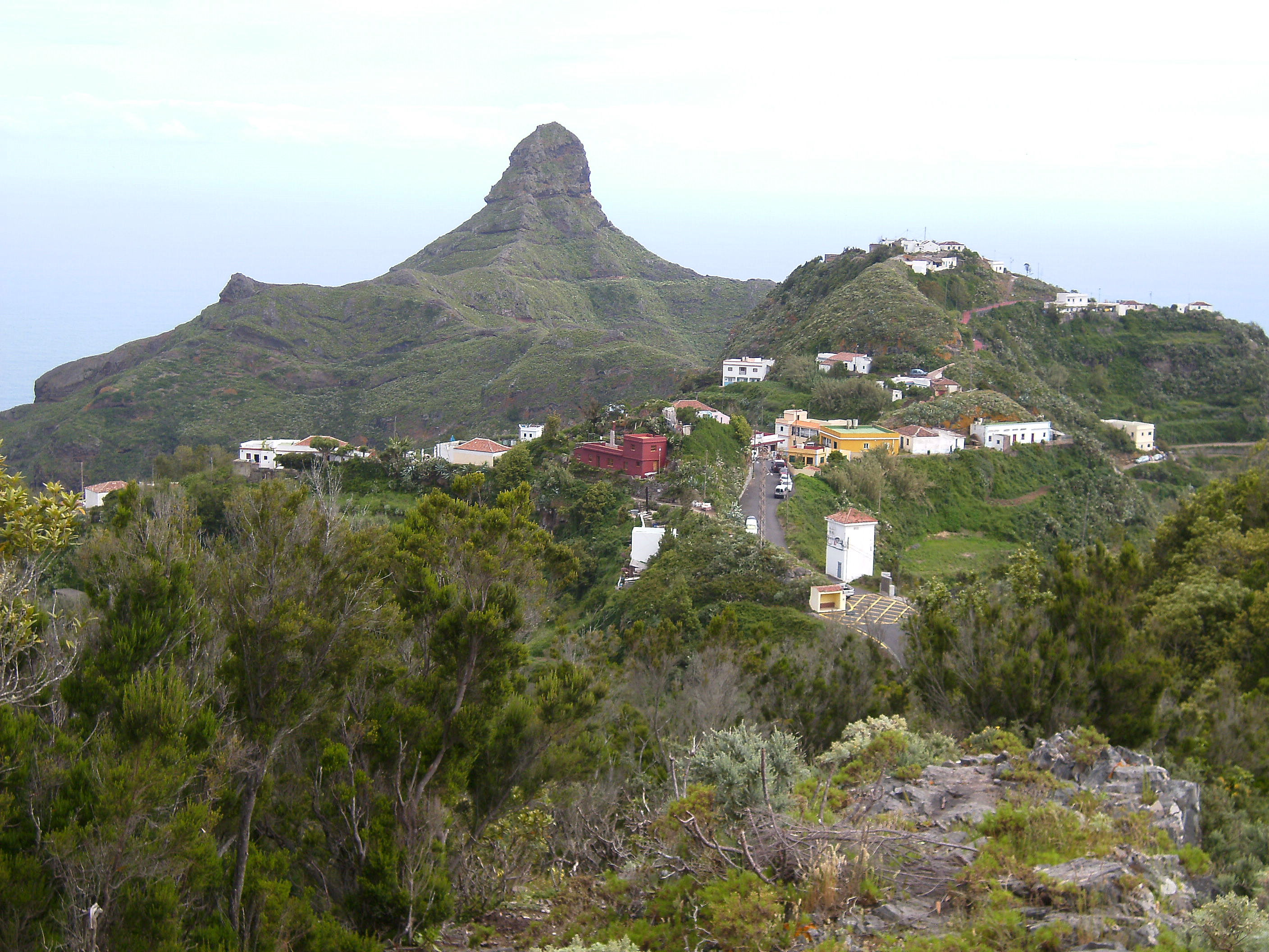 Vista del caserío de Taborno con su roque